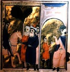 L'empereur Alexis reçoit les Croisés accueillis par un haut